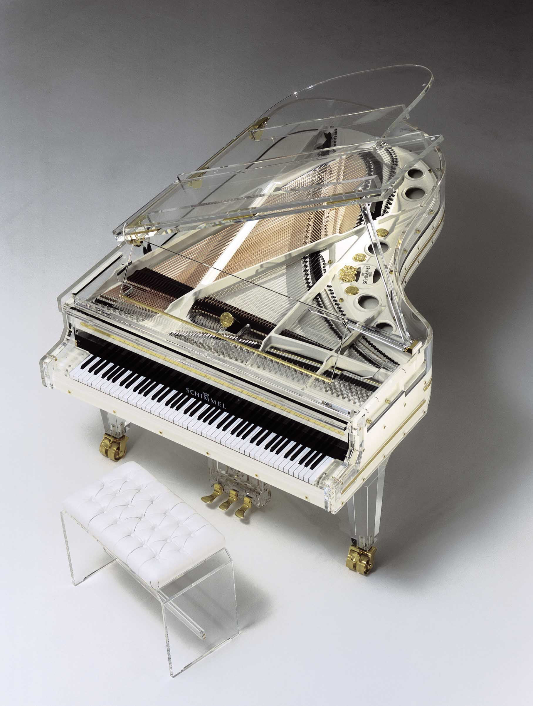 Schimmel Glasflügel, Schimmel Art-Collection